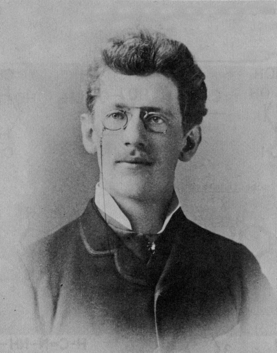 Ludwig Knorr (* 2. Dezember 1859 in München; † 4. Juni 1921 in Jena), als a. o. Professor des Chem. Instituts in Würzburg.